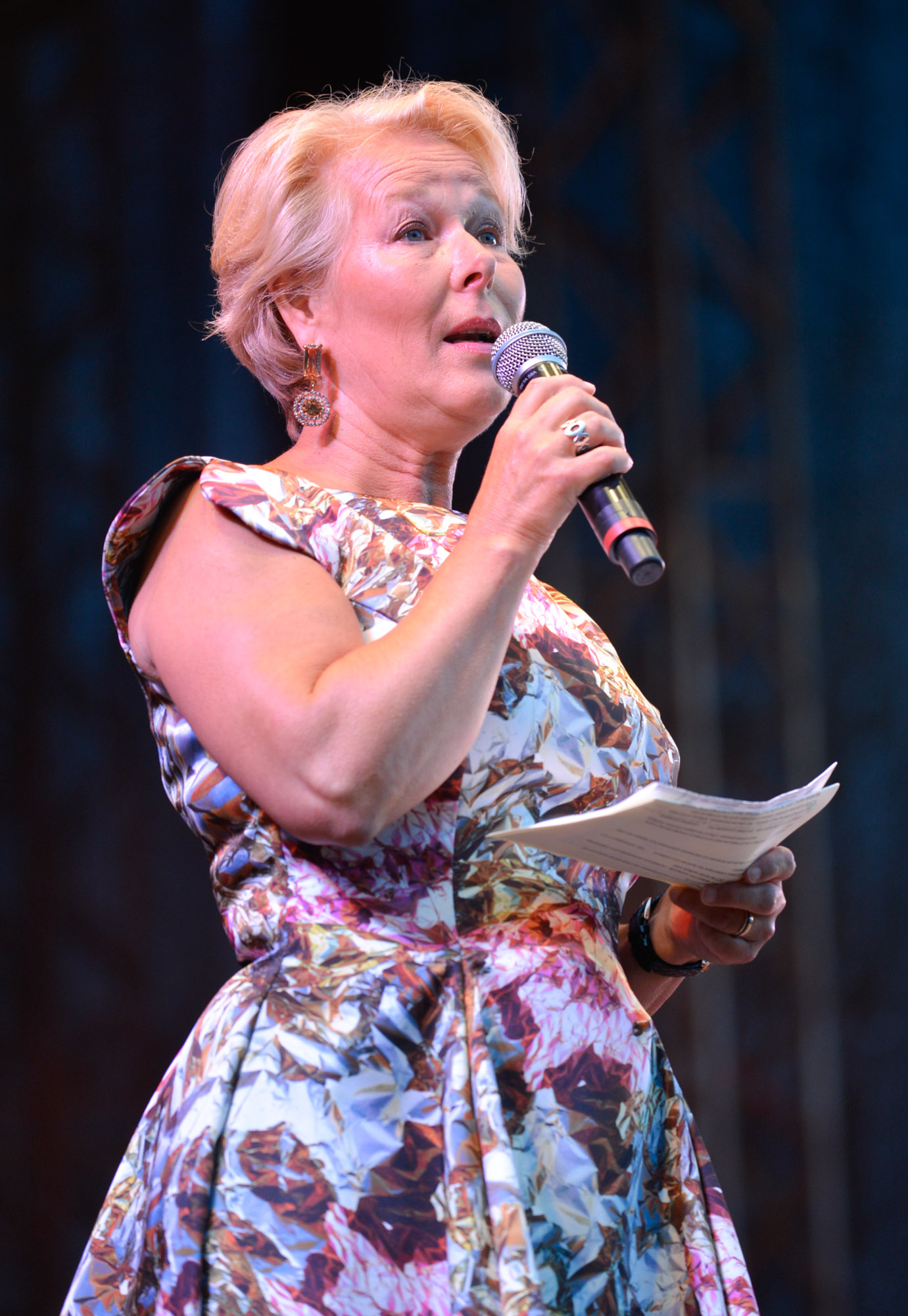 Birgitta Svendén på Gustav Adolfs torg under Stockholms Kulturfestival 2014.